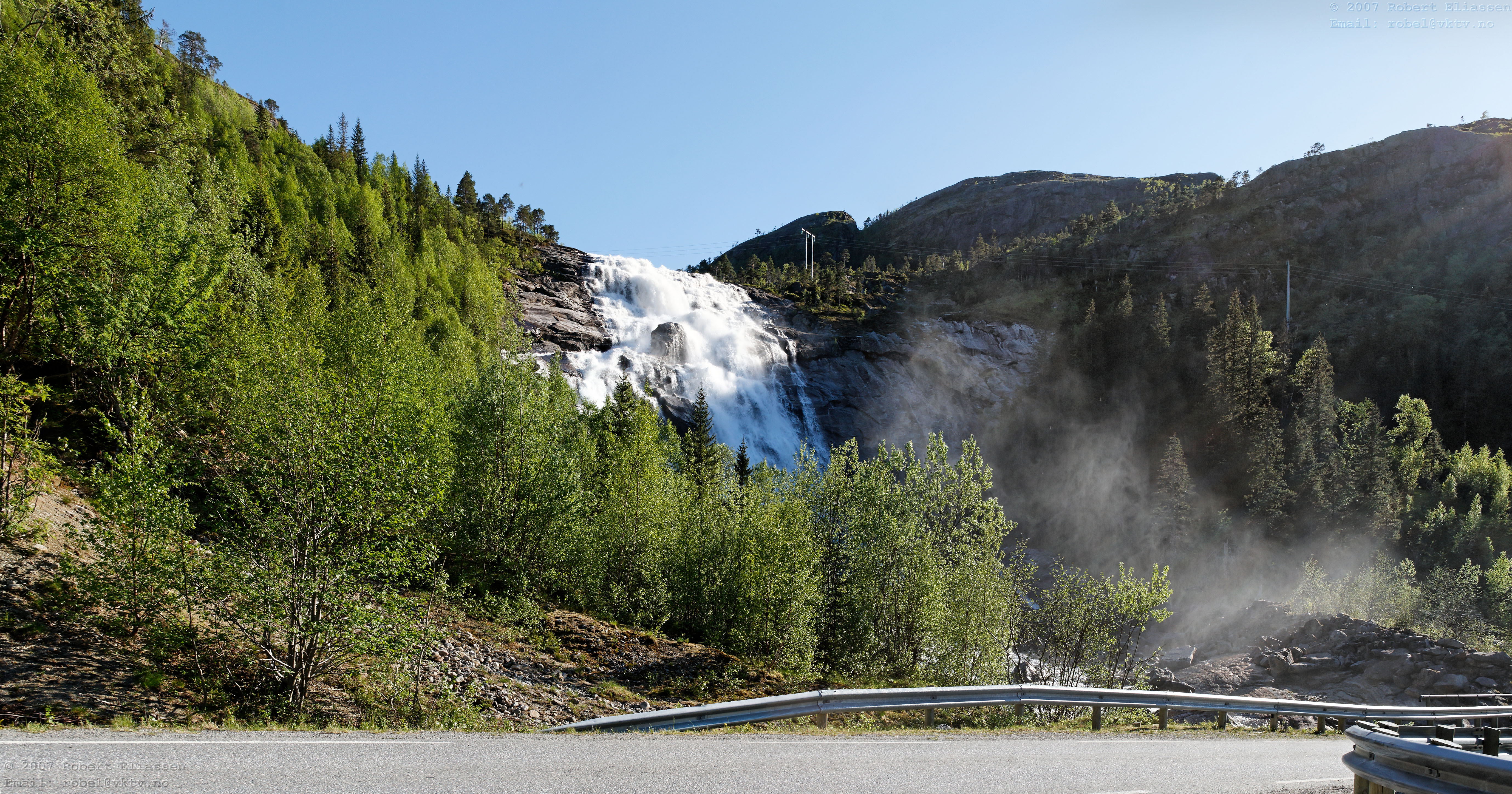 Waterfall near Skrøyvstad